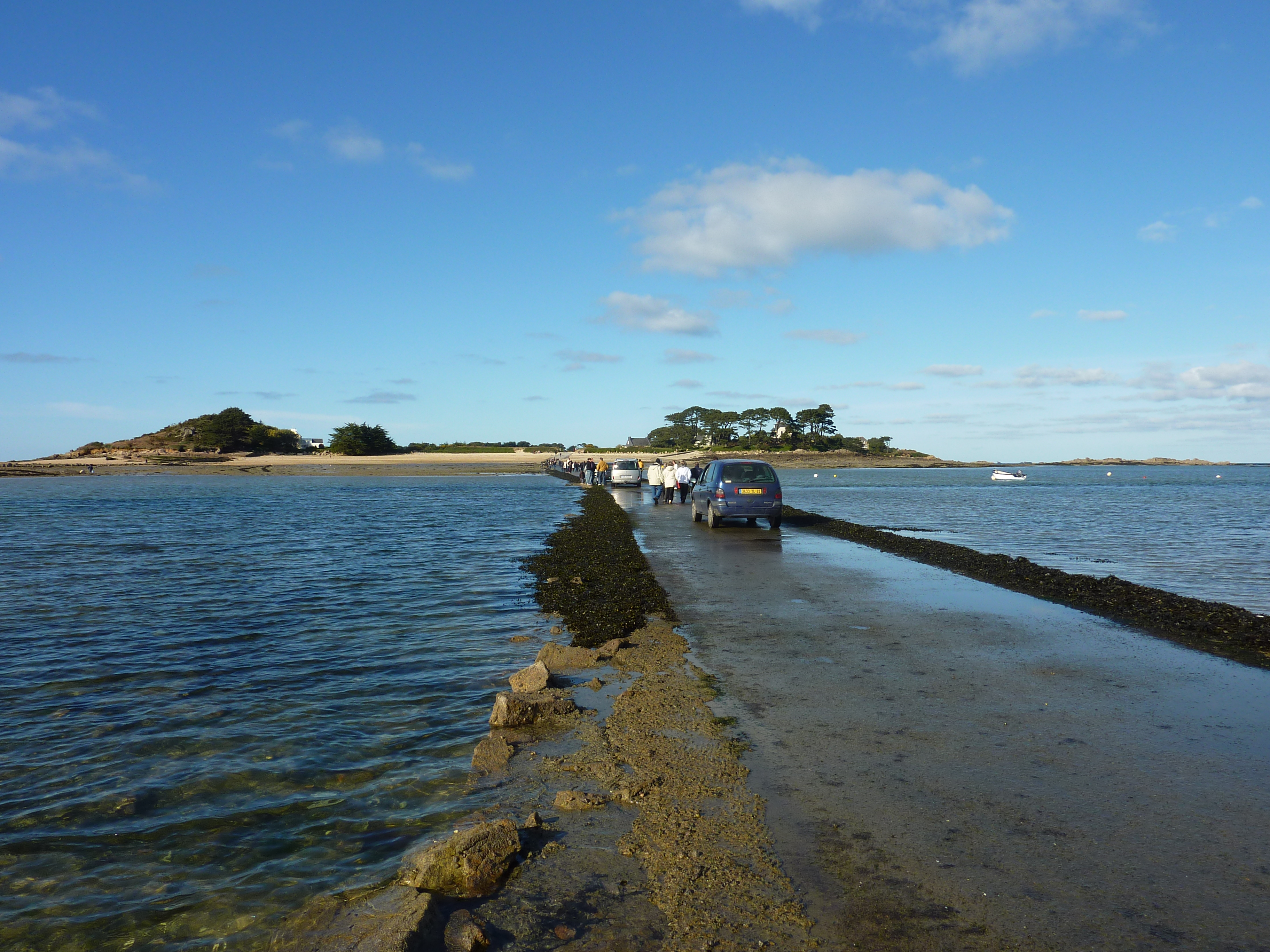 Carantec : la chaussée submersible menant à l'île Callot